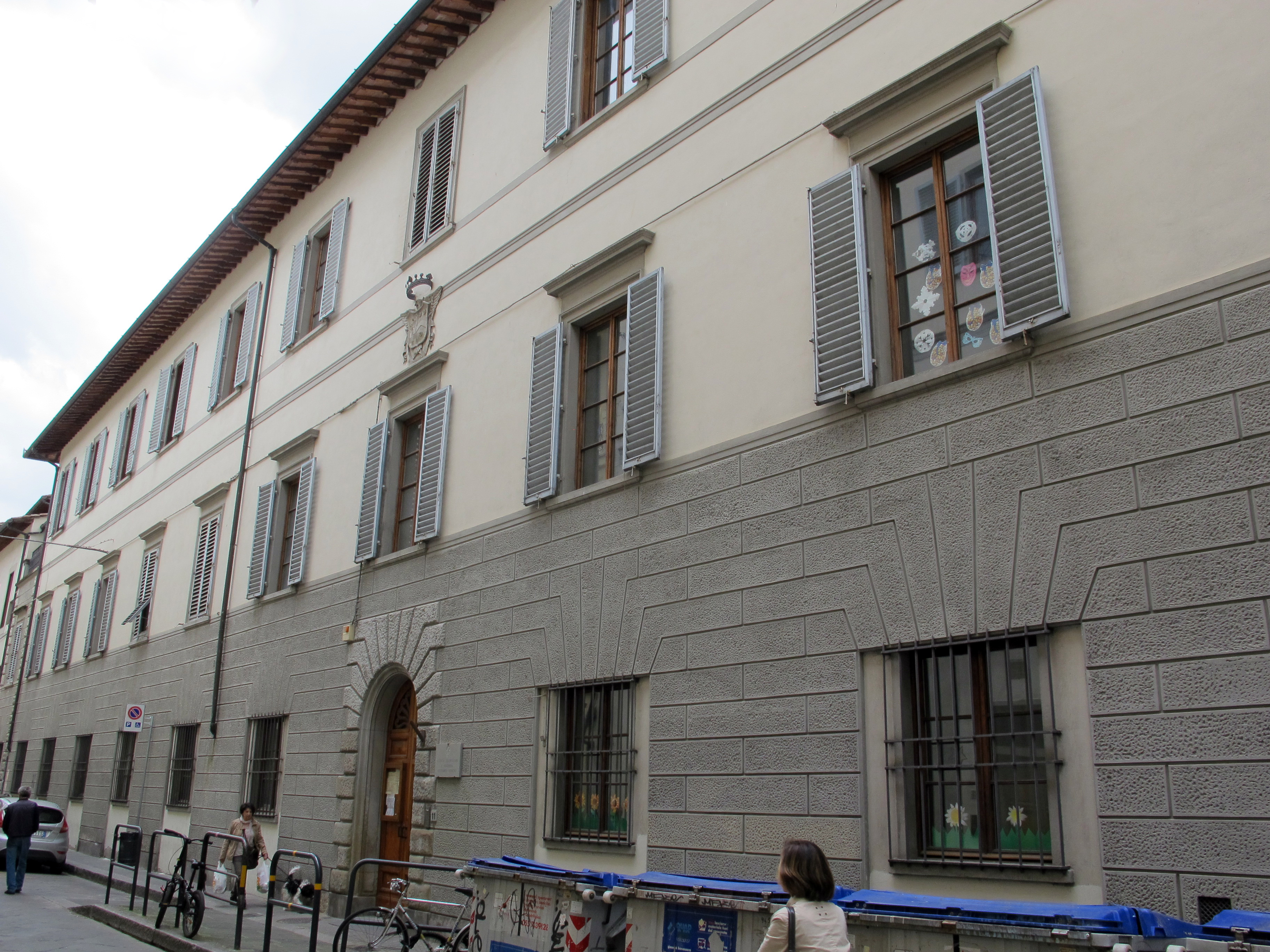 Via san giuseppe 11, palazzo con stemma